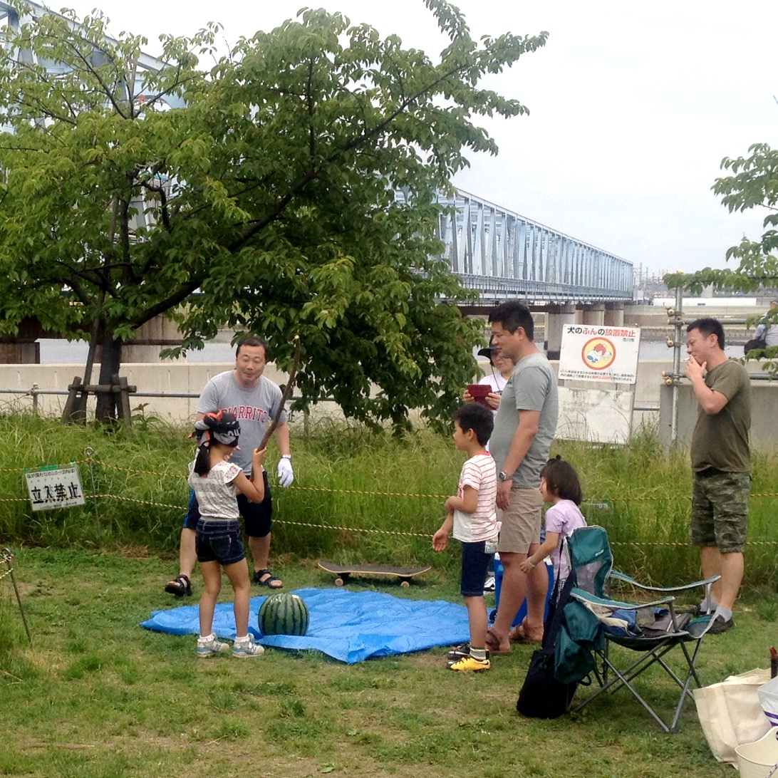 スイカ割り (suikawari)